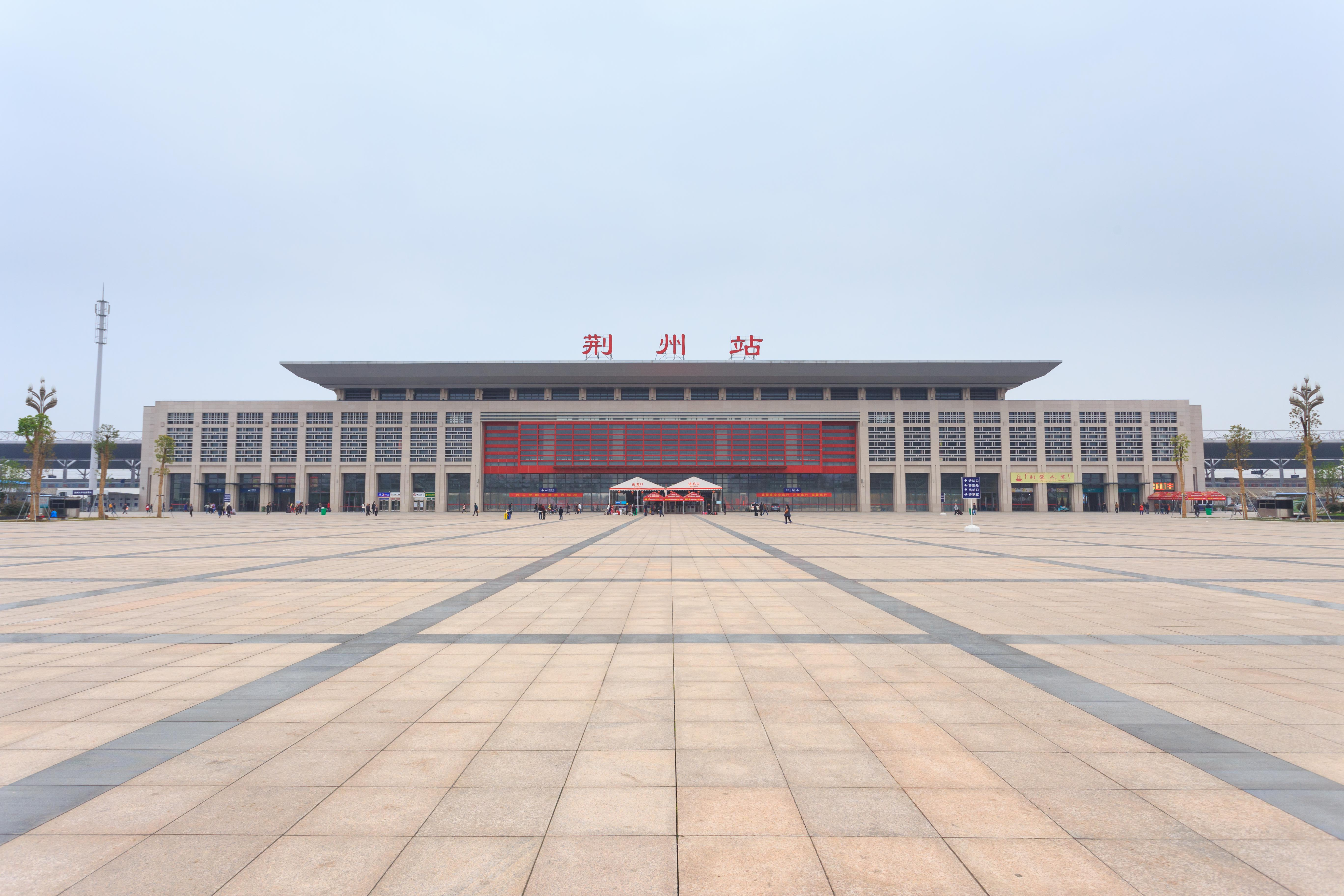 荆州站—— 站前广场